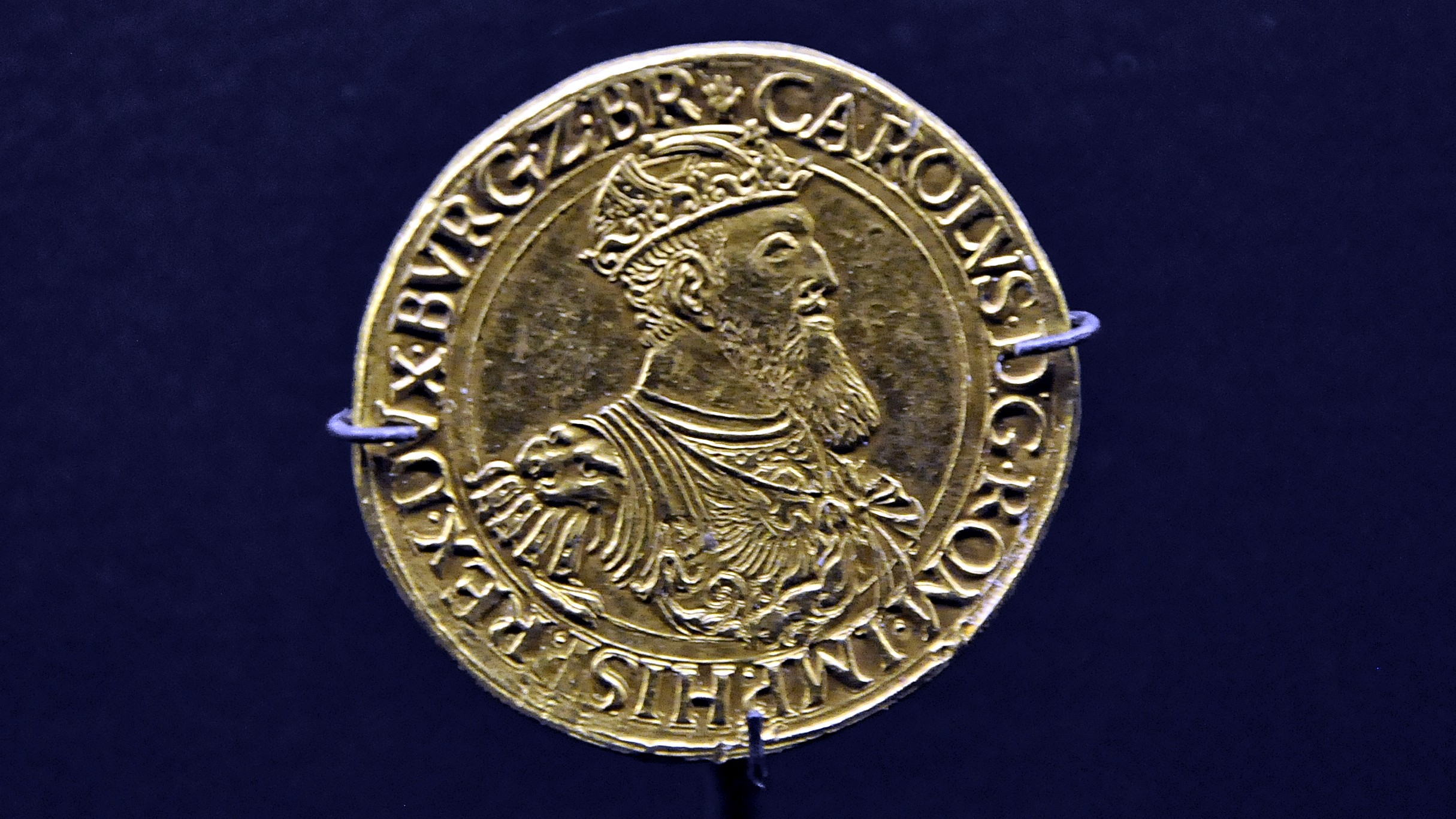 Een gouden Carolusgulden in het MAS te Antwerpen